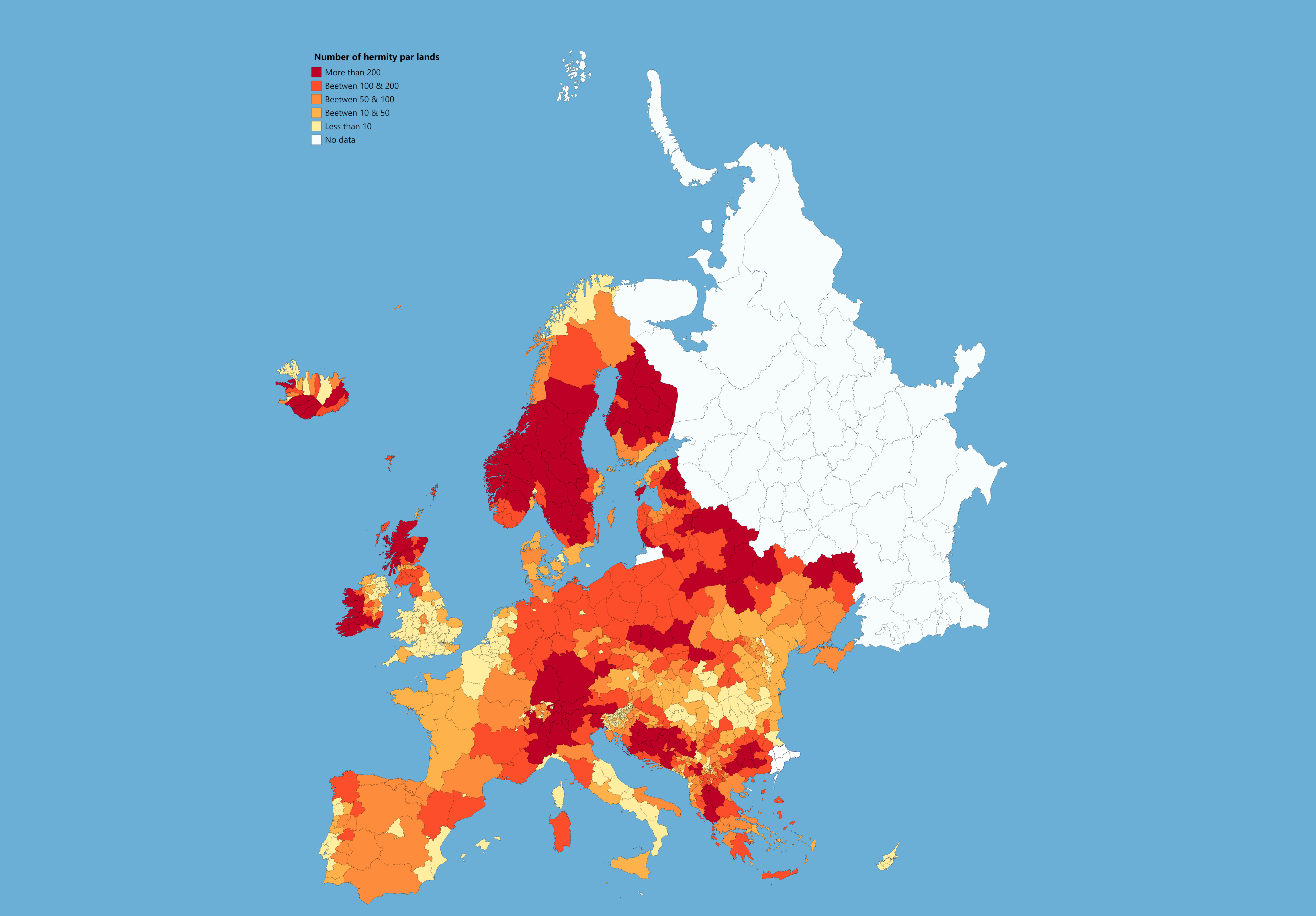 Estimated number of hermits per country11